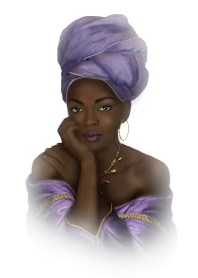 Tradigitale Malerei Leinwand Lauryn Hill